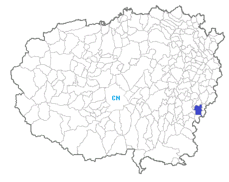 Posizione del comune nella provincia di Cuneo